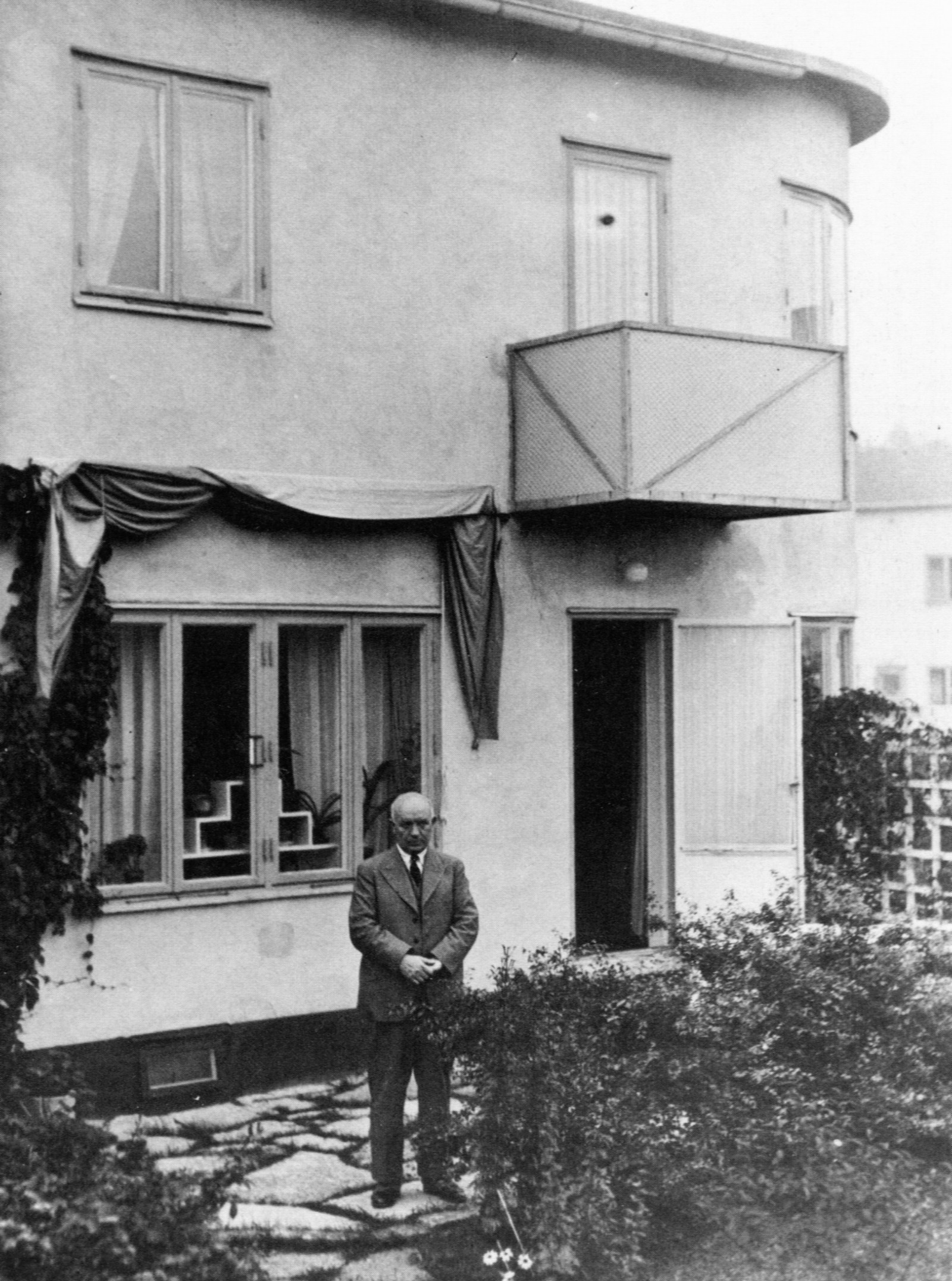 Per Albin Hansson vid sitt radhus i Ålsten. År 1933 flyttade statsministern Per Albin Hansson tillsammans med sin familj in i sitt radhus på Ålstensgatan 40, Bromma. Det var det största av de då nybyggda 94 radhusen på Ålstensgatan.